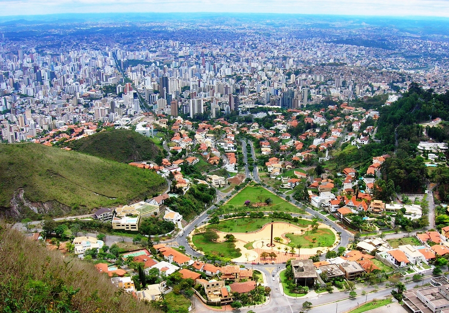 Praça do Papa, com Belo Horizonte ao fundo - Minas Gerais - Brasil. **Foto tiada do alto da Serra do Curral em 2006